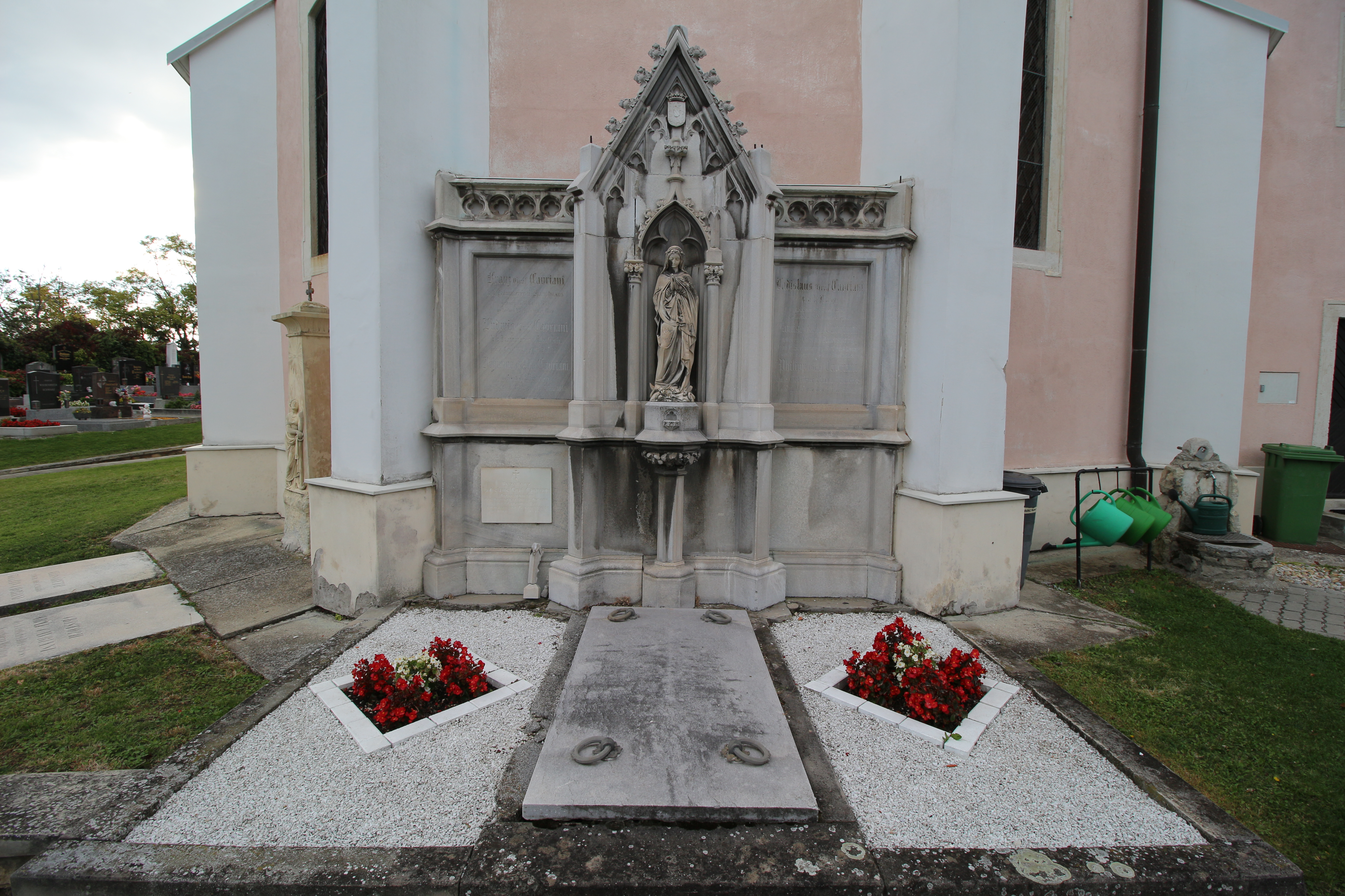 Kath. Pfarrkirche hl. Pankratius, Wehrmauer und Friedhof. Familiengrab Cavriani an der Ostseite der Kirche.